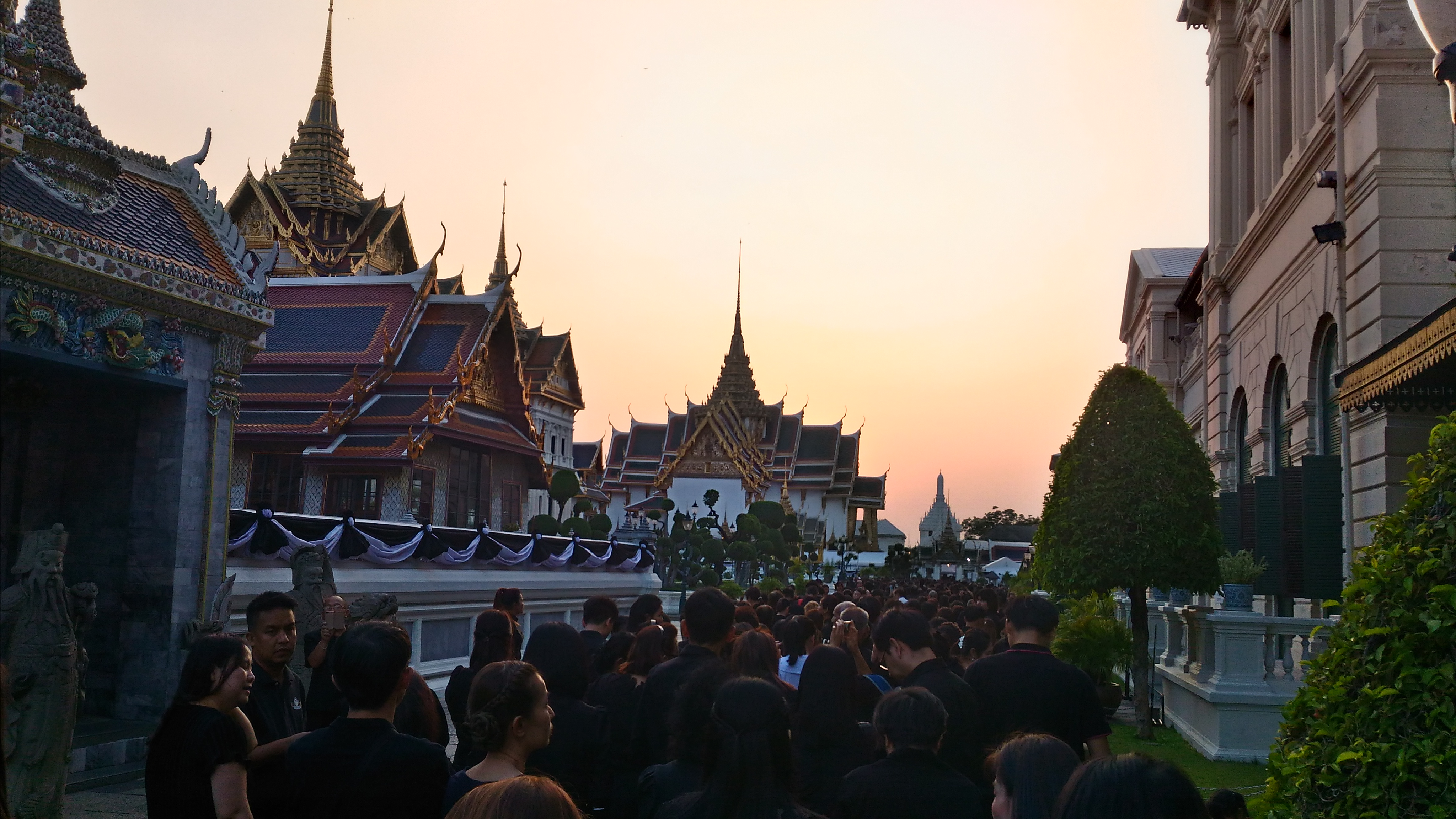 ประชาชนต่อแถวเพื่อรอเข้าสักการะพระบรมศพ พระบาทสมเด็จพระปรมินทรมหาภูมิพลอดุลยเดช สยามินทราธิราช บรมนาถบพิตร ซึ่งประดิษฐาน ณ พระที่นังดุสิตมหาประสาท ในพระบรมมหาราชวัง กรุงเทพฯ บันทึกภาพเมื่อวันที่ ๑๓ กุมภาพันธ์ พ.ศ. ๒๕๖๐